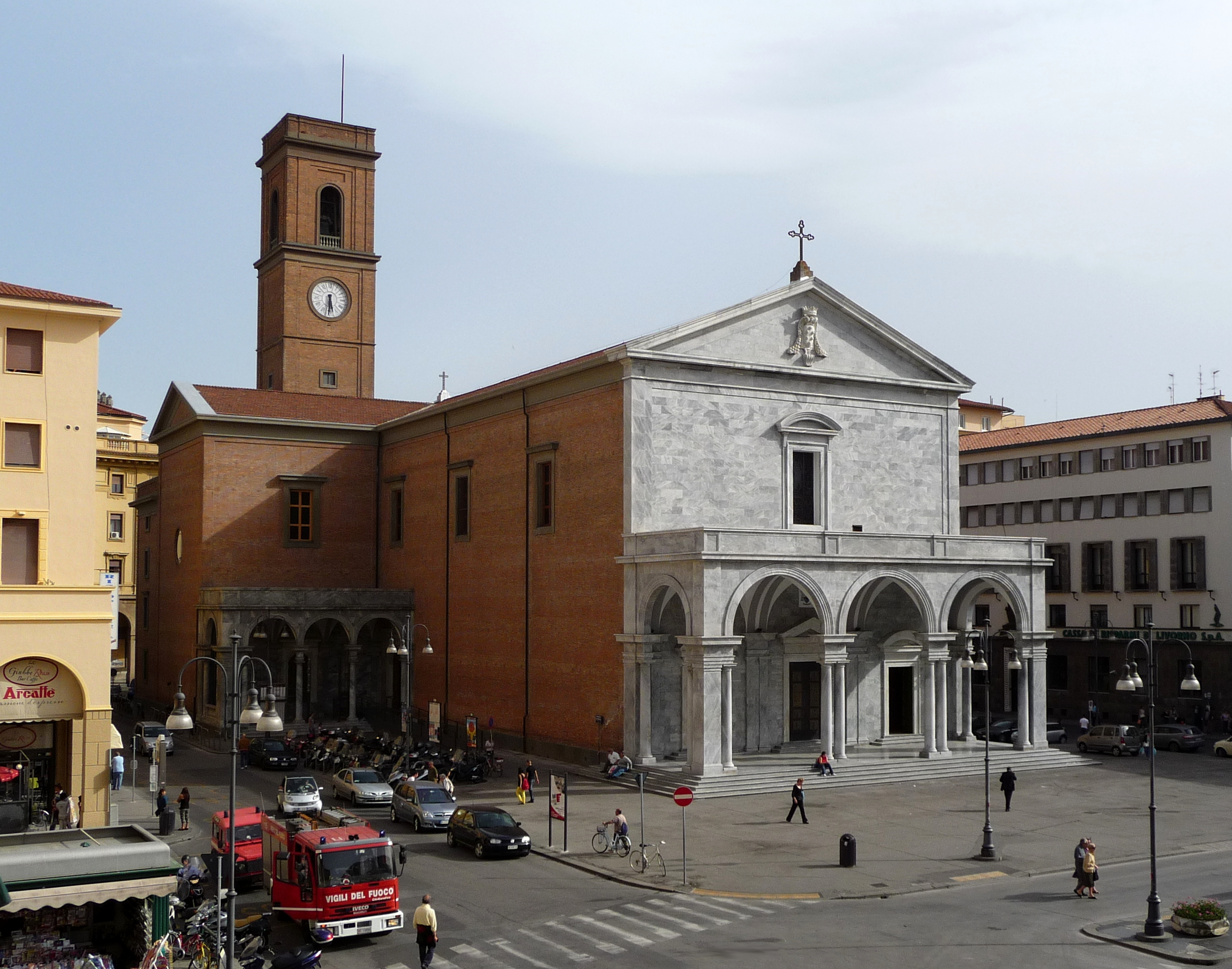 Duomo di Livorno, Livorno, Italy